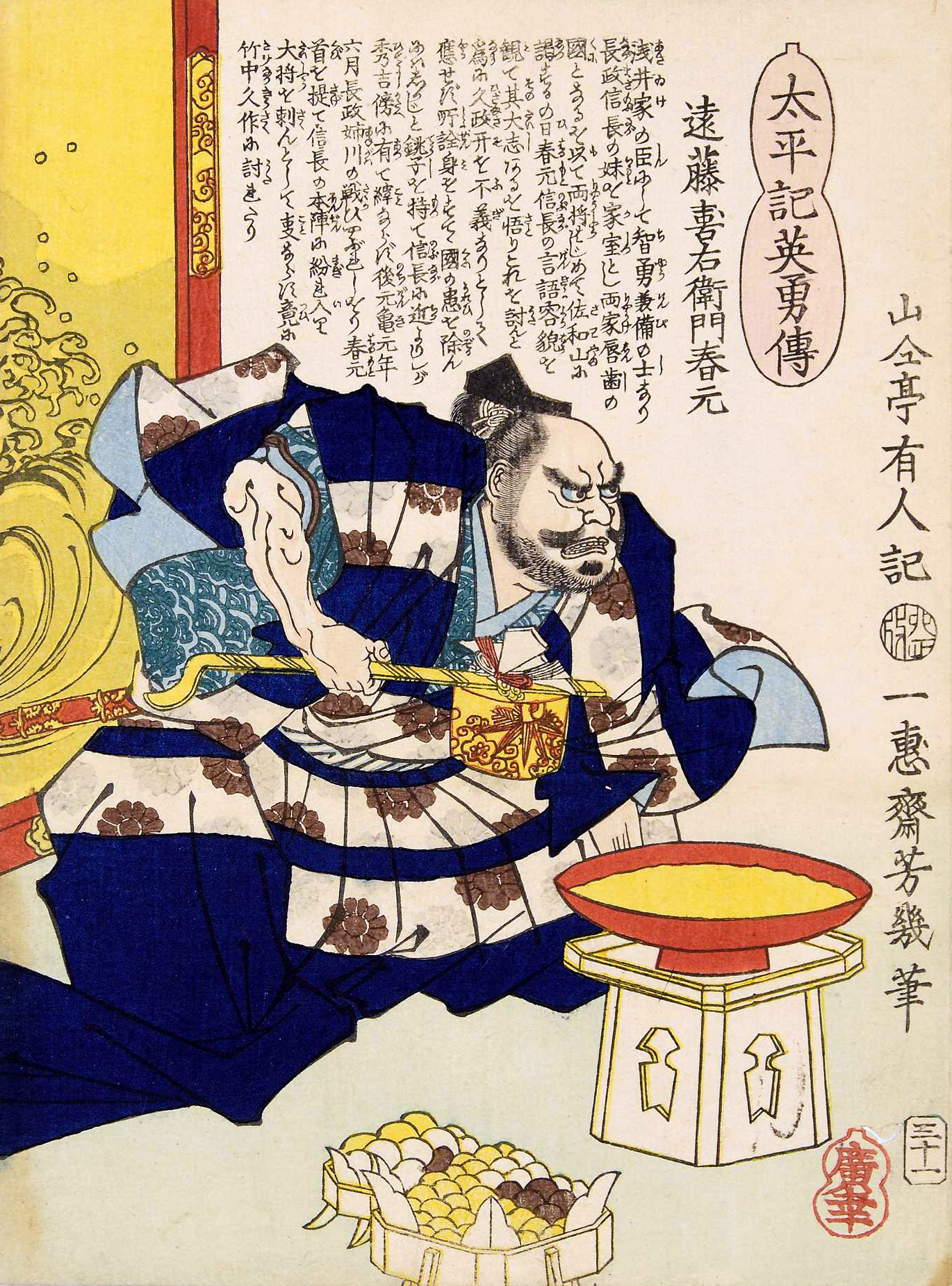 「太平記英勇伝三十一：遠藤喜右衛門春元（遠藤直経）」